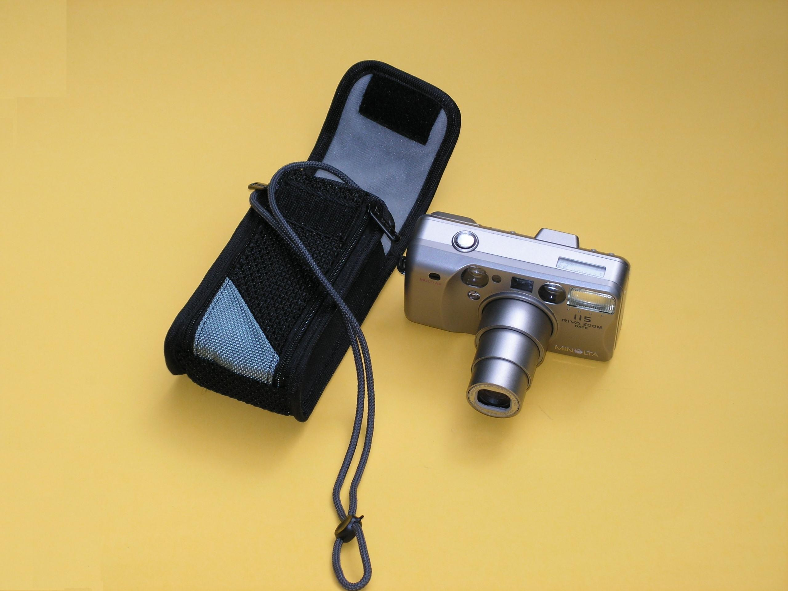 Kamera Minolta